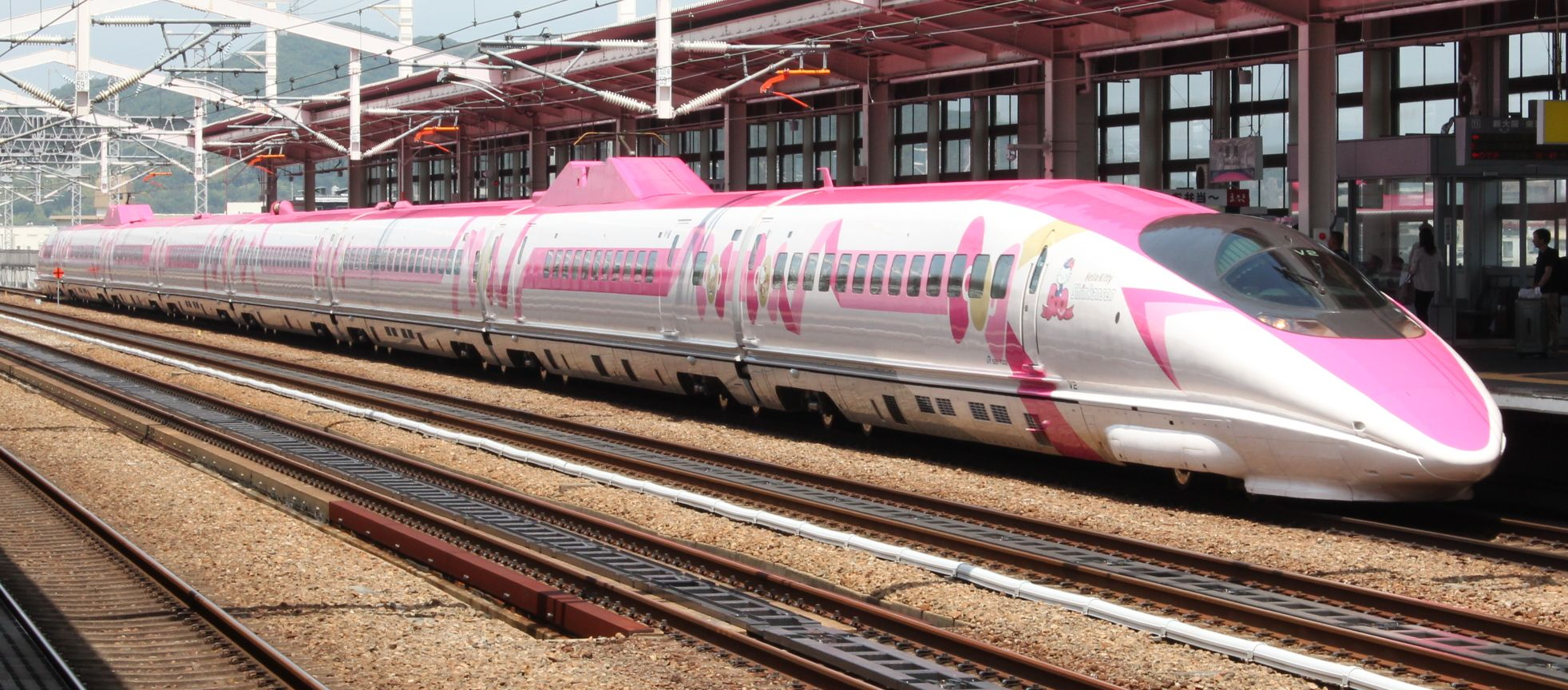 新幹線500系電車 Ｖ２編成 JR西日本「ハローキティ新幹線」塗装 姫路駅で撮影 Canon EOS Kiss X5